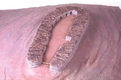 Maqueta del aspecto del poblado de Genó en la Edad del Bronce Final.